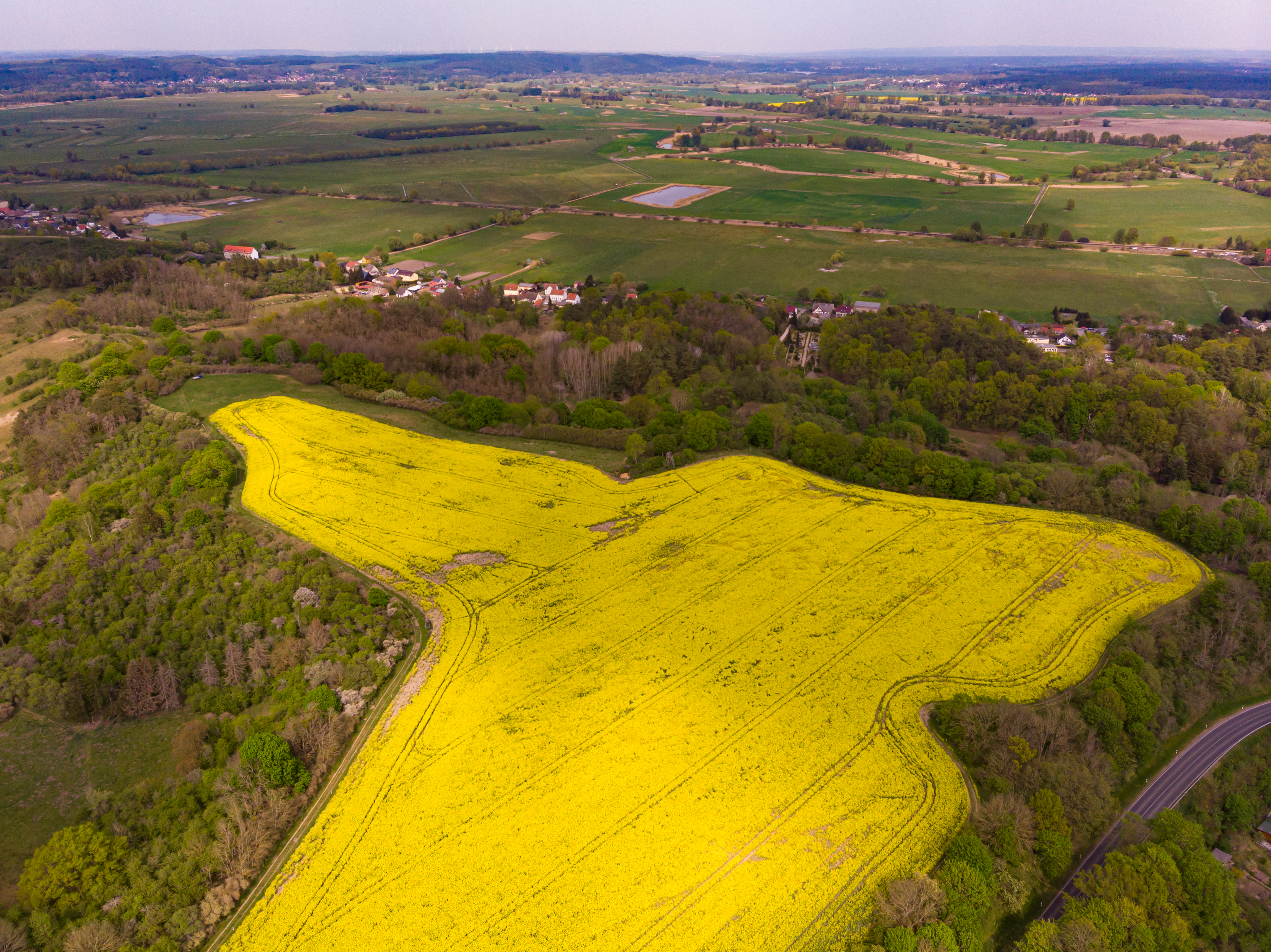 Falkenberg